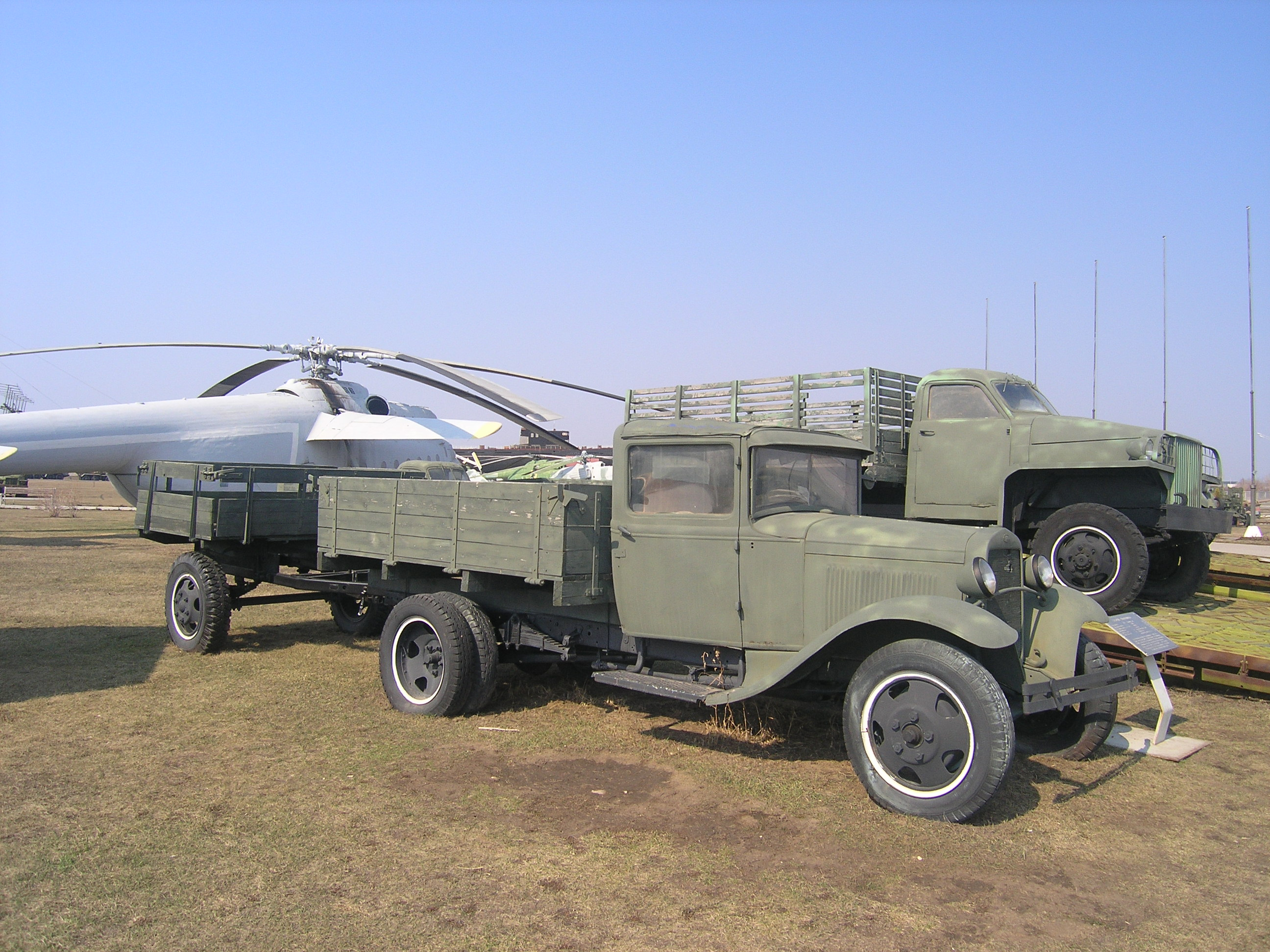 ГАЗ-АА "Полуторка" в Техническом музее Тольятти.